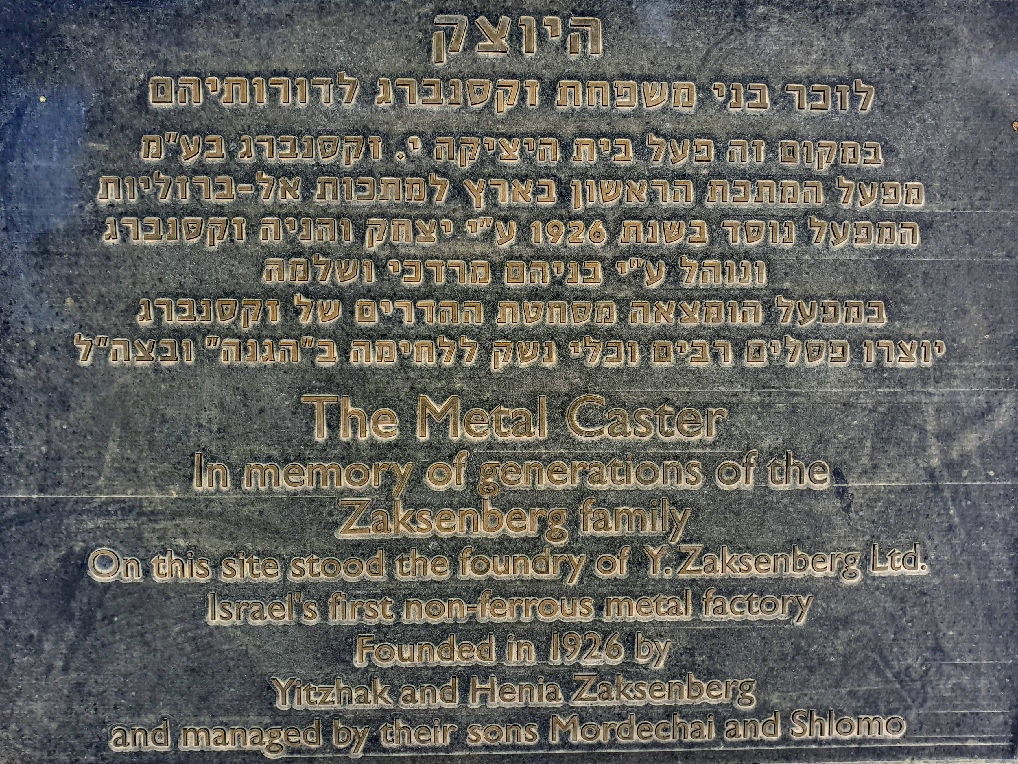 הטקסט המקורי כפי שהוא מופיע בתחתית פסל היוצק בדרך אבא הלל 15 רמת גן